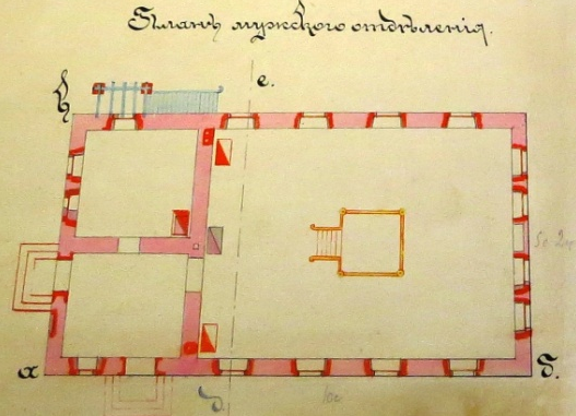 План мужчынскага аддзялення Лідскай сінагогі 1893 года